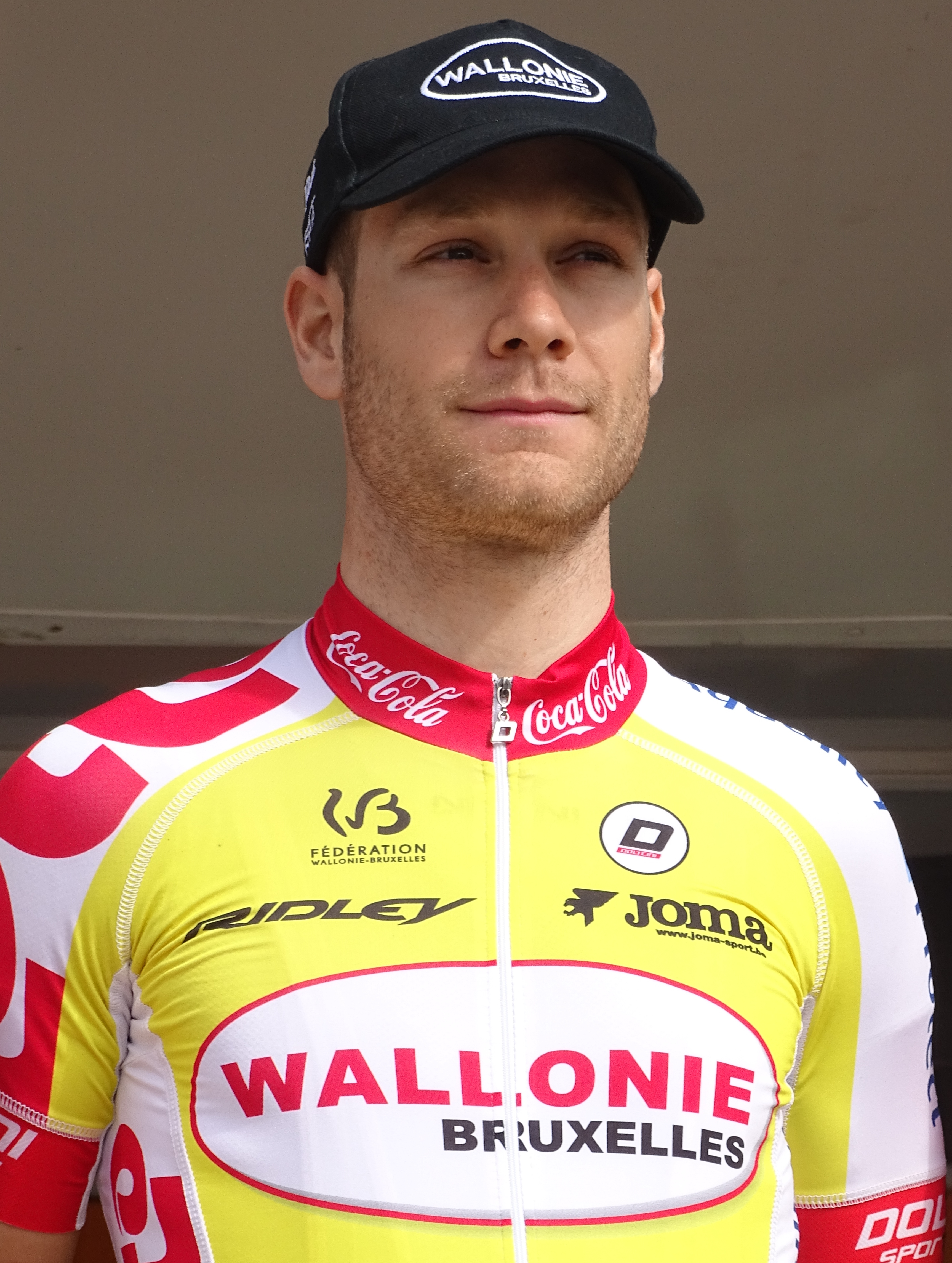 Reportage réalisé le jeudi 16 avril à l'occasion du départ et de l'arrivée du Grand Prix de Denain 2015 à Denain, Nord, Nord-Pas-de-Calais, France.